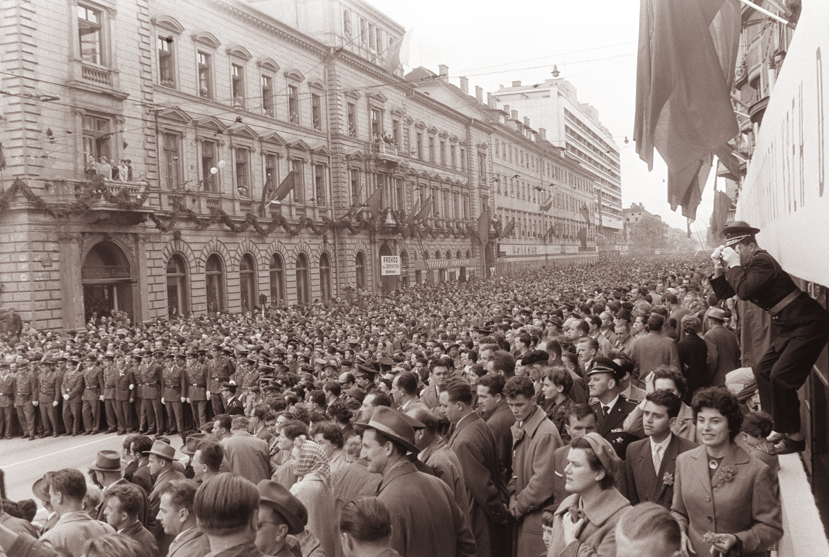 Prvomajski sprevod v Ljubljani